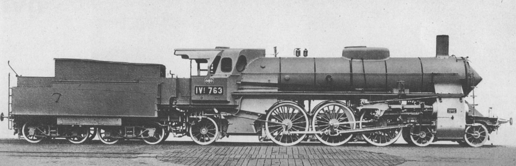 Dampflokomotive Badische IV f.